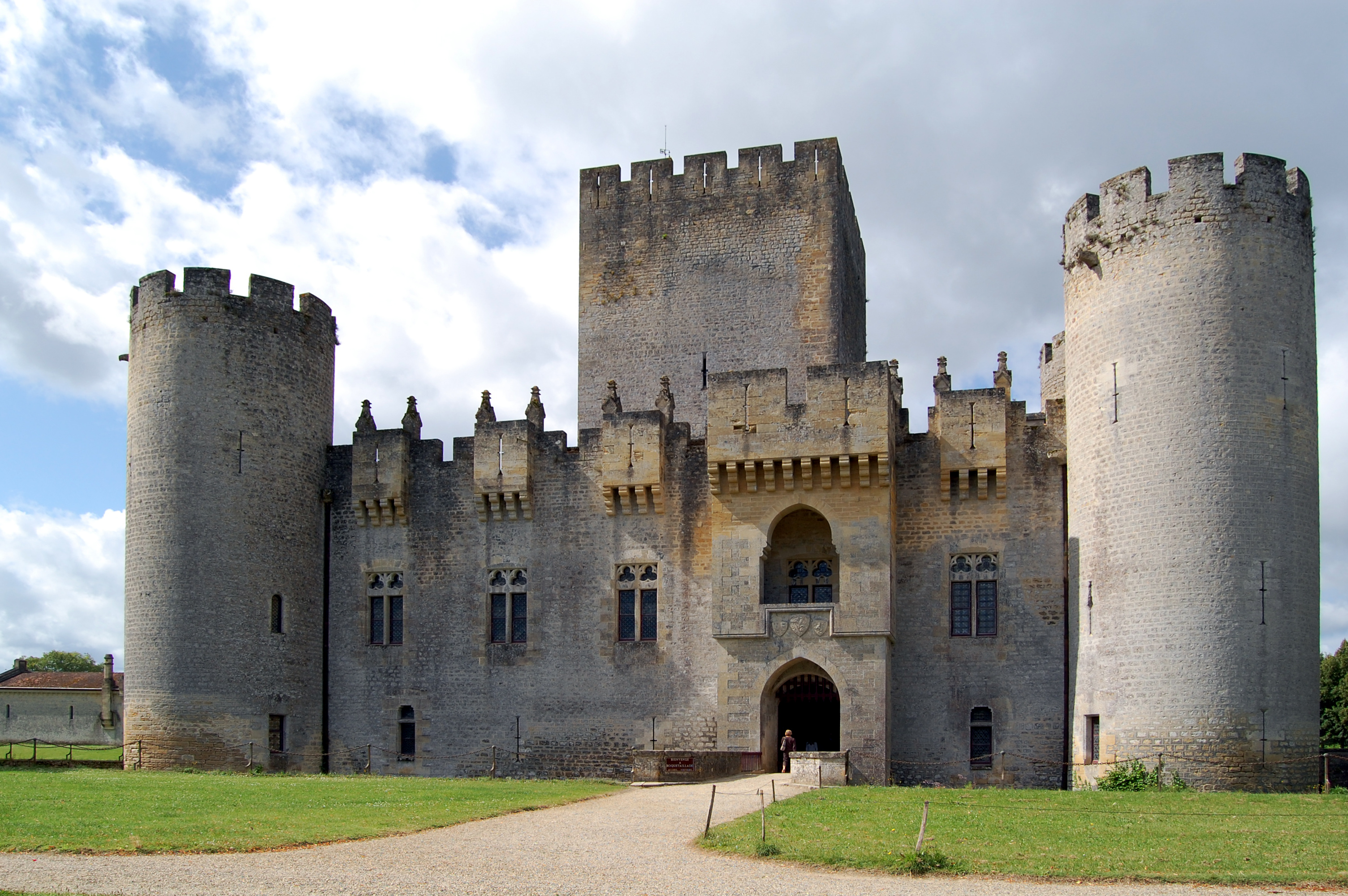 Château de Roquetaillade (Gironde, France) This building is en partie classé, en partie inscrit au titre des Monuments Historiques. .